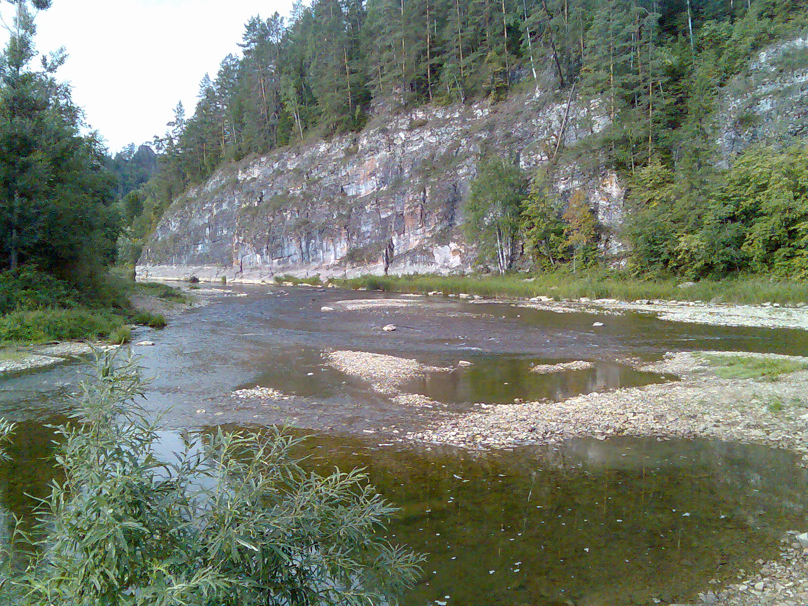 Устье Большого Шишеняка